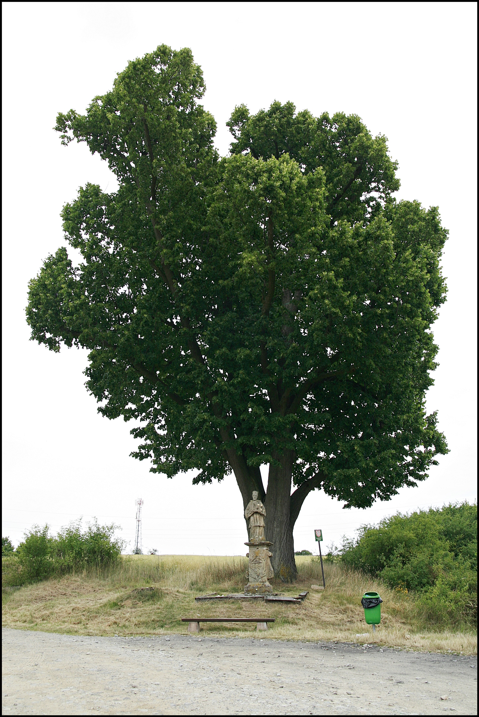 Lípa na návrší u silnice mezi Sušicí a Hrádkem